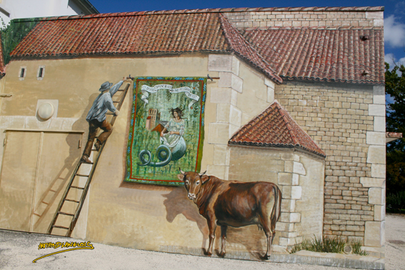 Armand Langlois (né en 1947), La Légende de Mélusine, 2011, fresque, Clussais-la-Pommeraie.